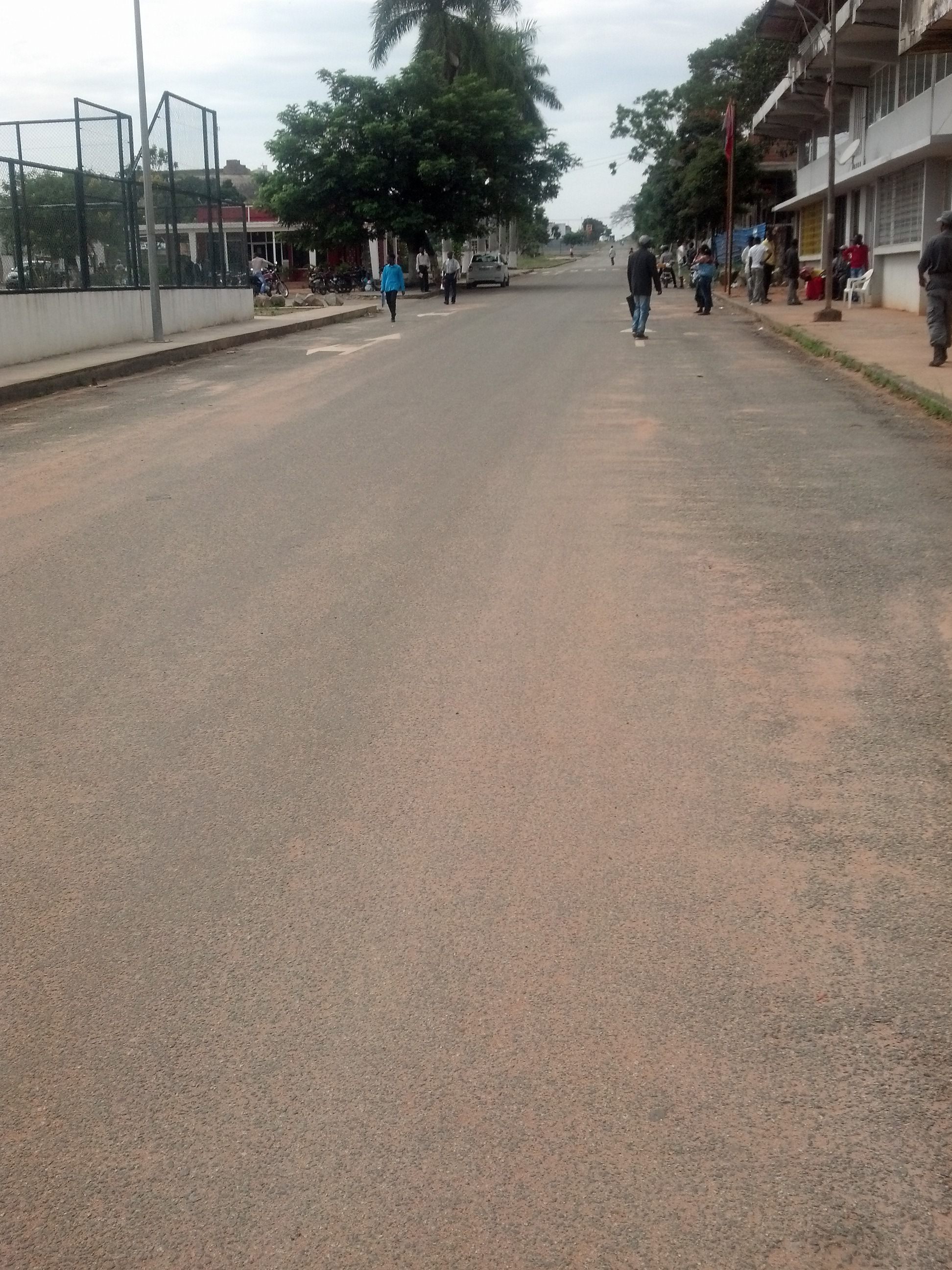 Rua principal do Municipio da Quibala, junto ao Registo civil.